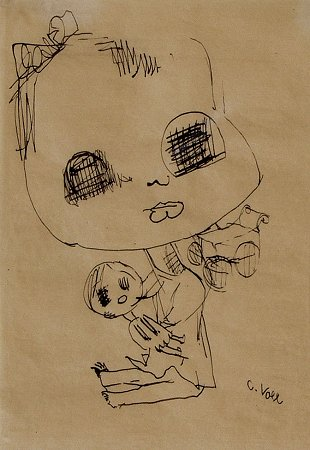 Kind mit Puppe, um 1921, Tuschefederzeichnung, 23 x 15 cm